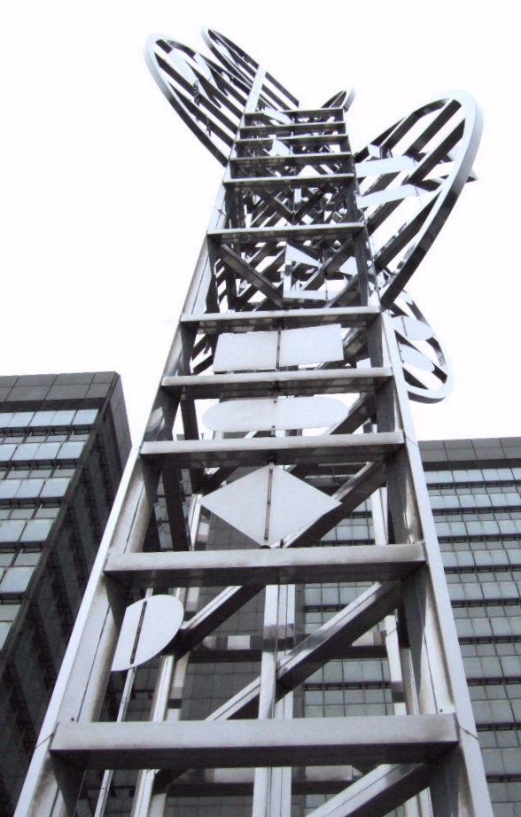 Nicolas Schöffer: Chronos 15 (1977) Material: Edelstahl + Scheinwerfer Standort: Stadthaus